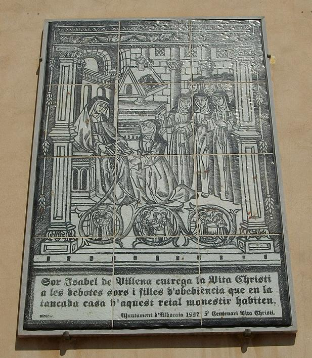 Placa commemorativa al mur de l'església, del cinqué centenari del Vita Christi d'Isabel de Villena, que fou abadessa del Monestir de la Trinitat.